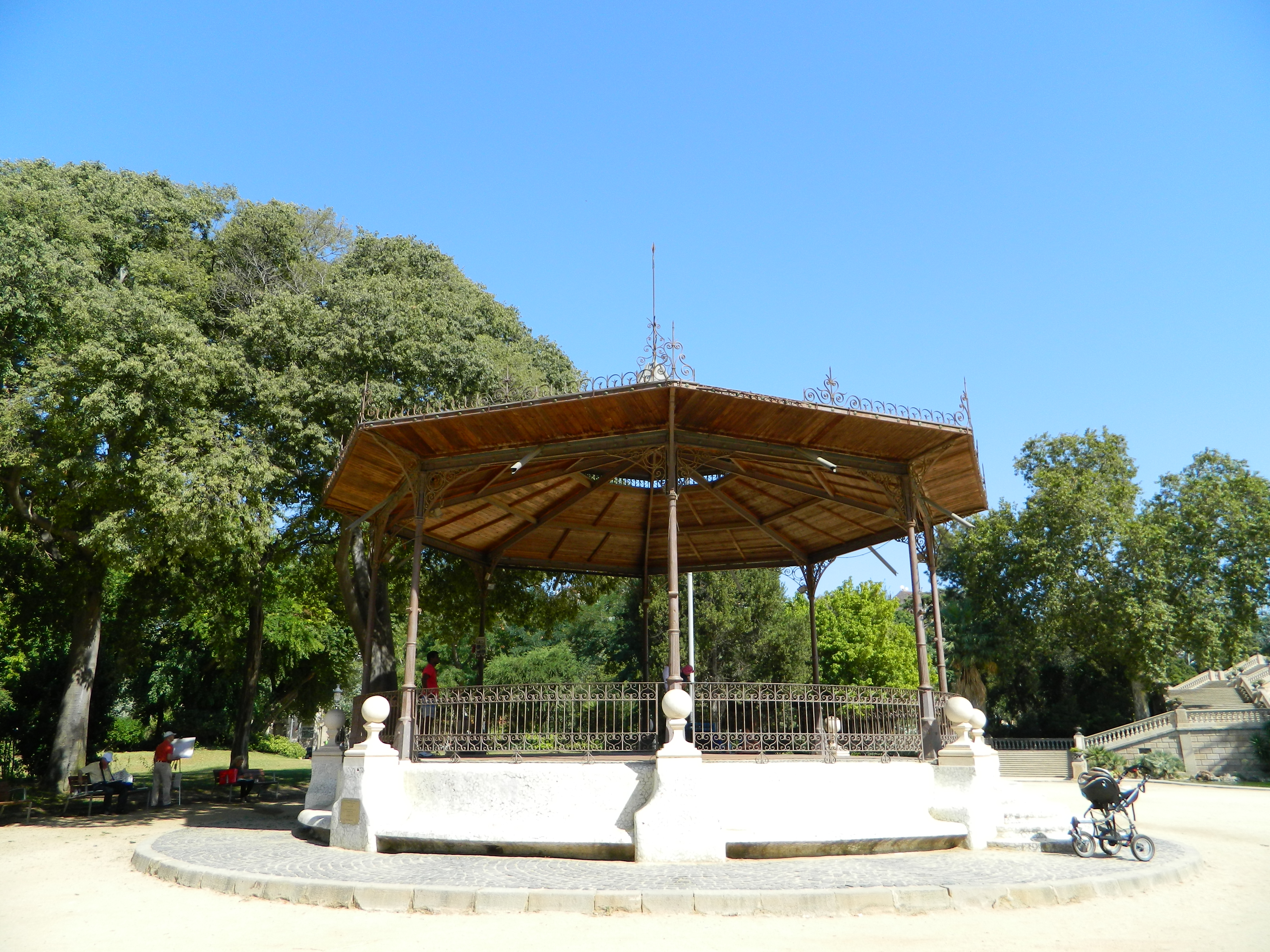 Barcelona